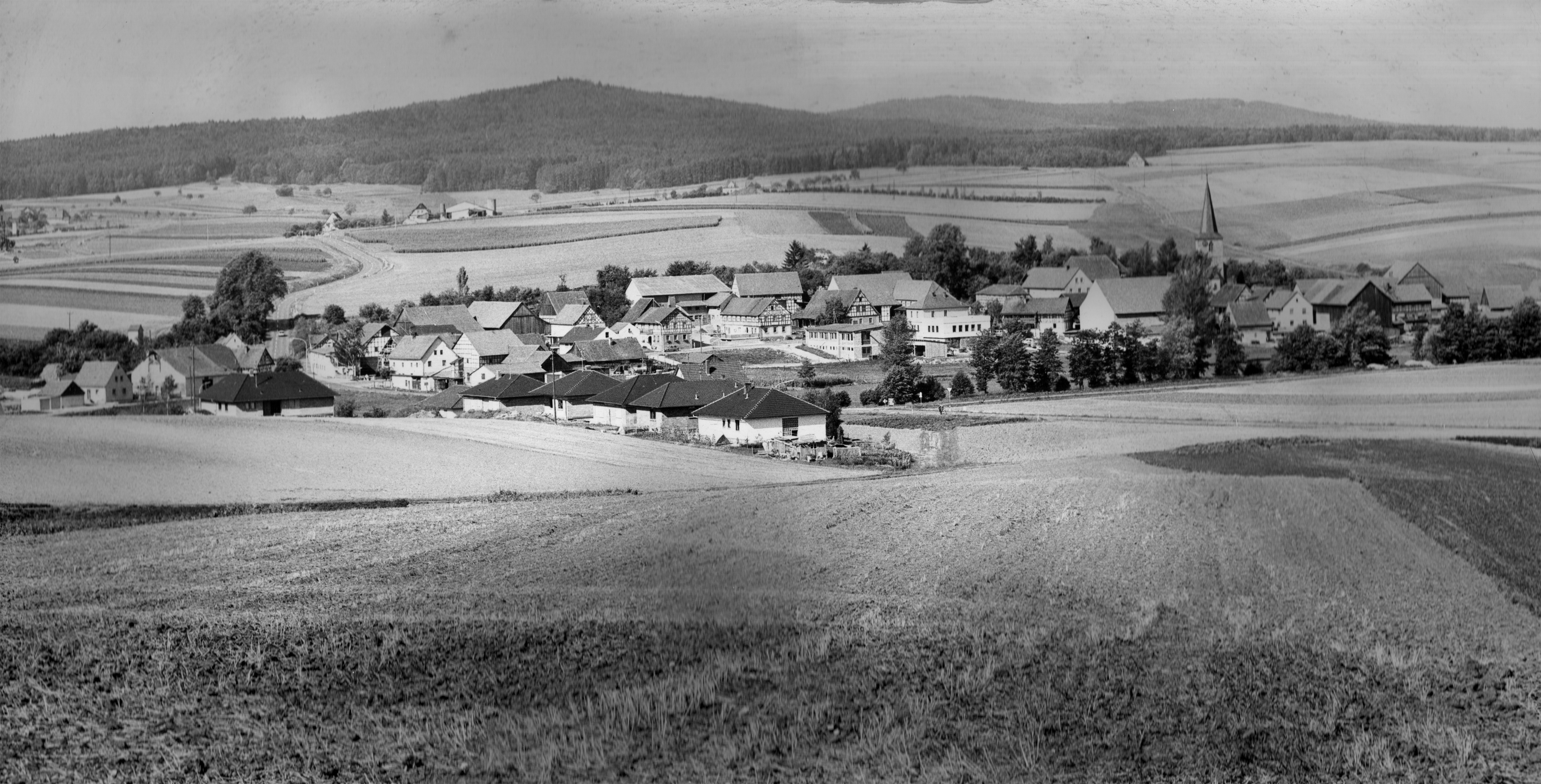 Diese Foto stammt aus den 70ern